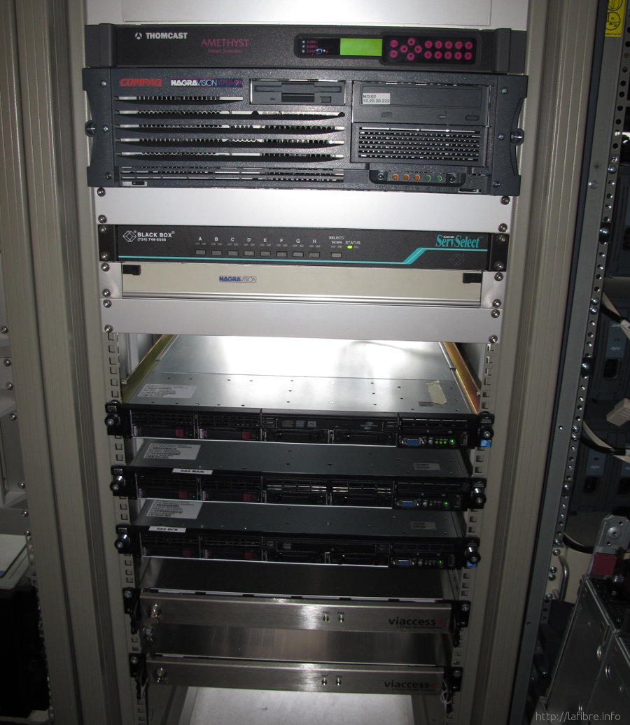 Baies Viaccess et serveur Compaq CityPlay Amiens